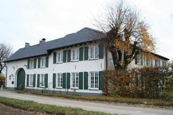 Wohnhaus in Wegberg-Felderhof